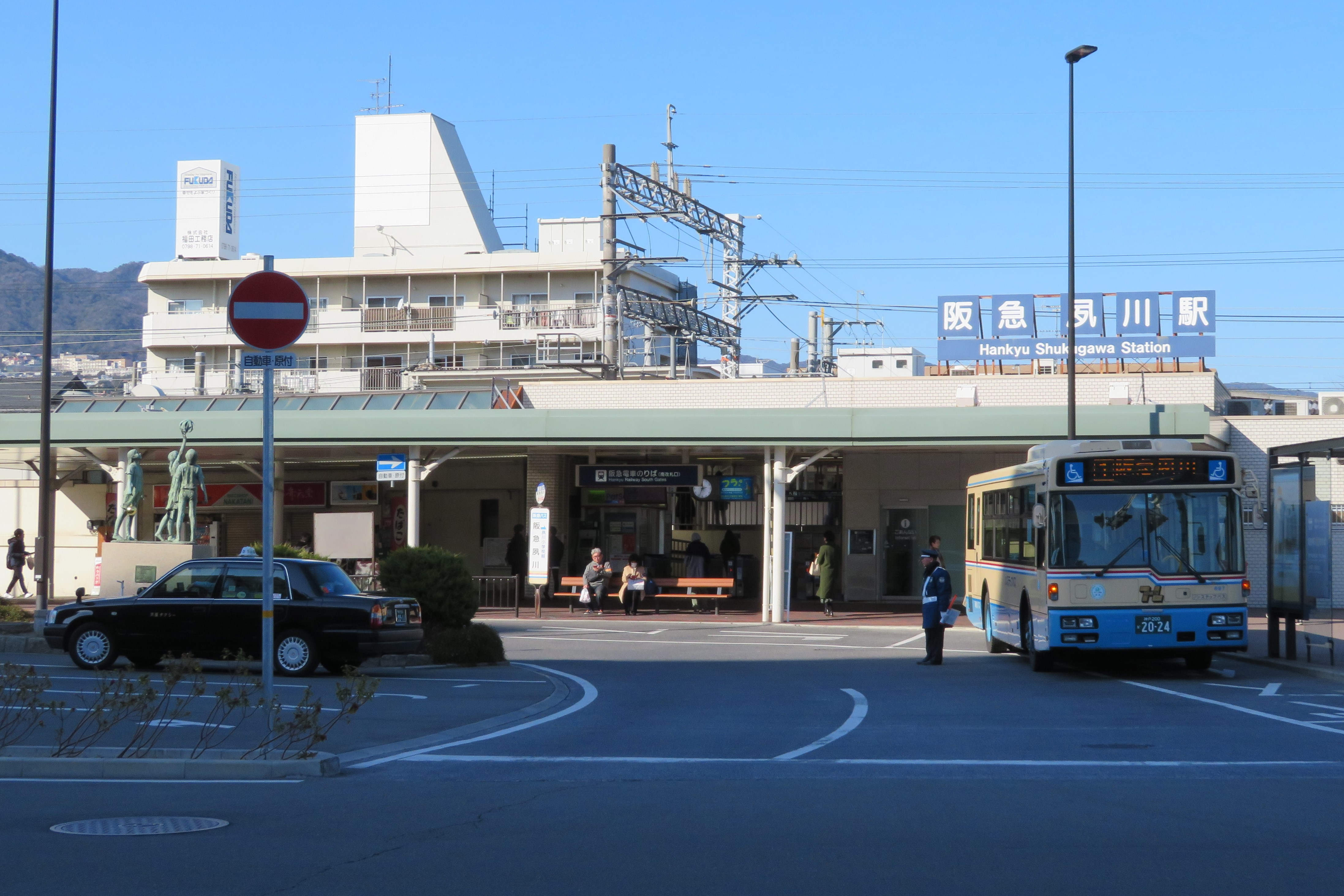 阪急電鉄夙川駅